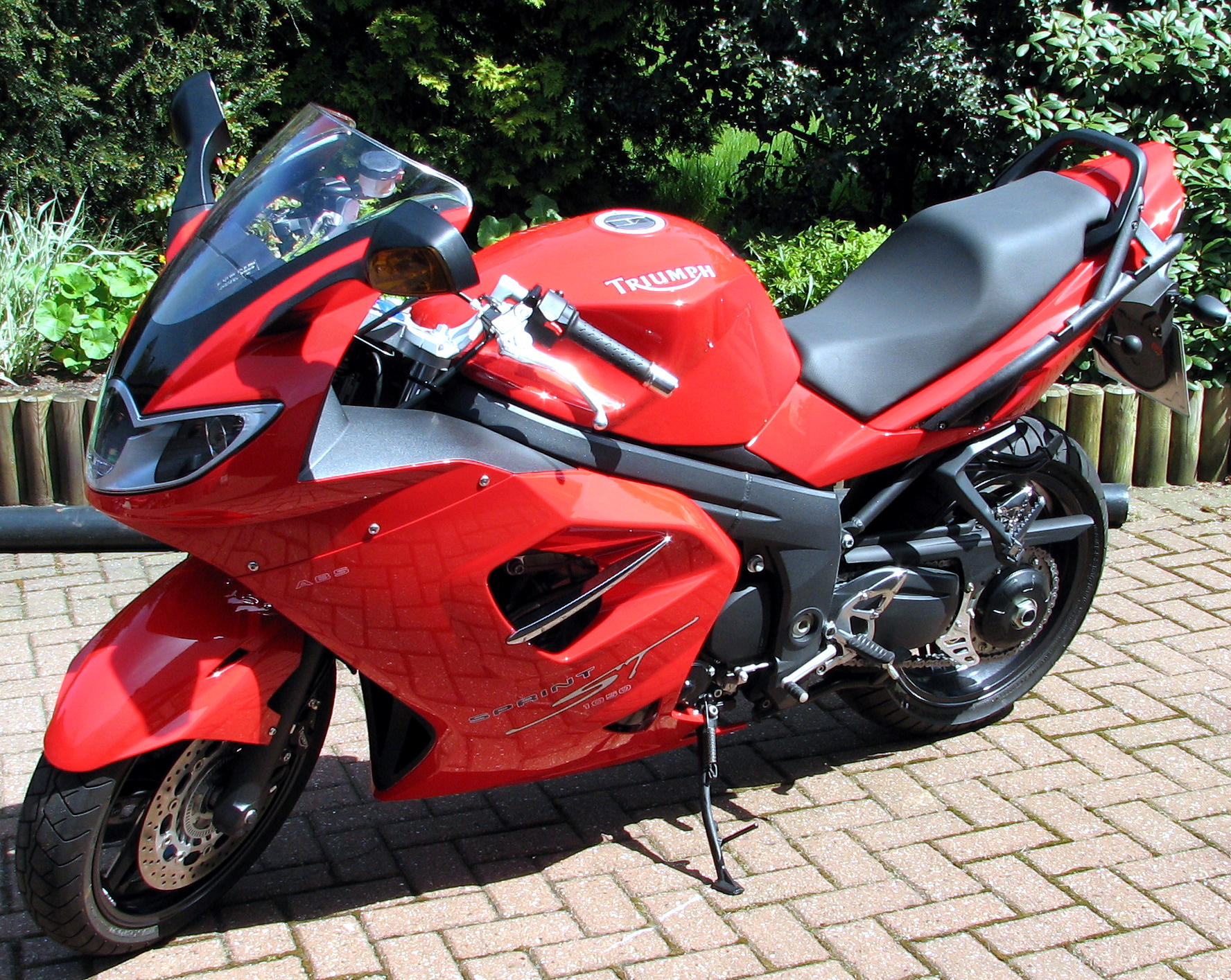 Bild einer Triumph Sprint ST 1050 Baujahr 2007